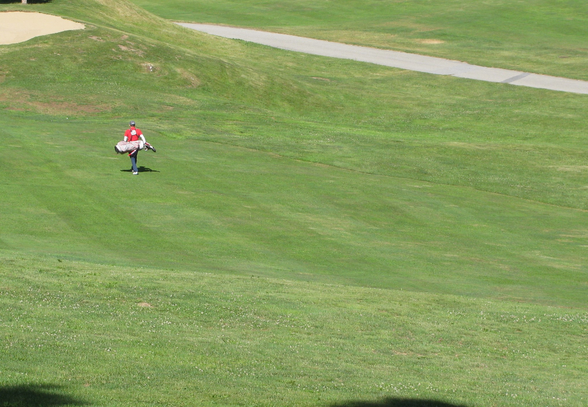 Quantitätskontrast, 16.7.2019, Golfer auf dem Golfplatz Source du Rhône in Obergesteln (Obergoms / Wallis / Schweiz). Der entfernte Golfer ist klein im Gegensatz zur großen Fläche der Wiese.